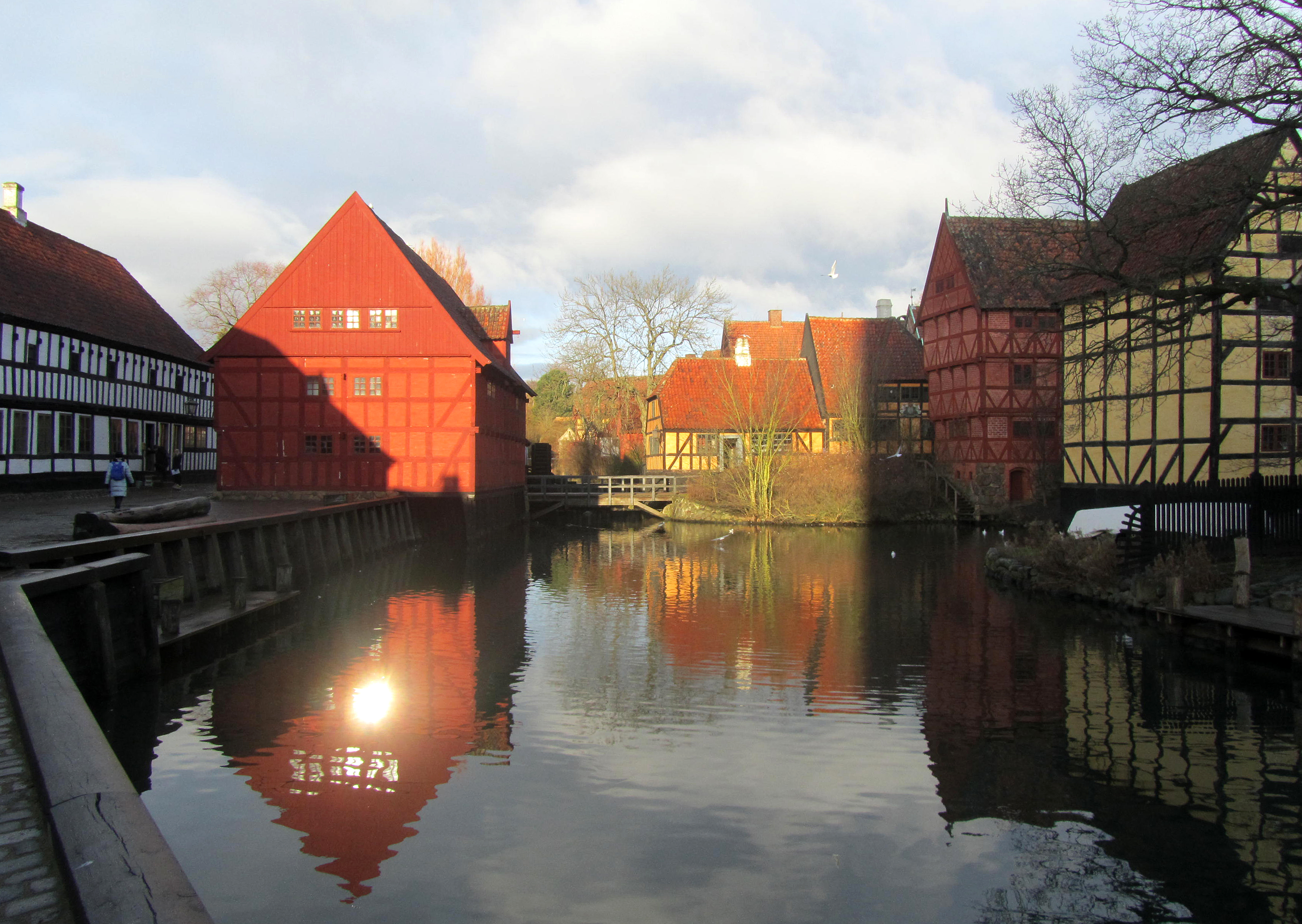 Vinterlys i Den Gamle By i Aarhus